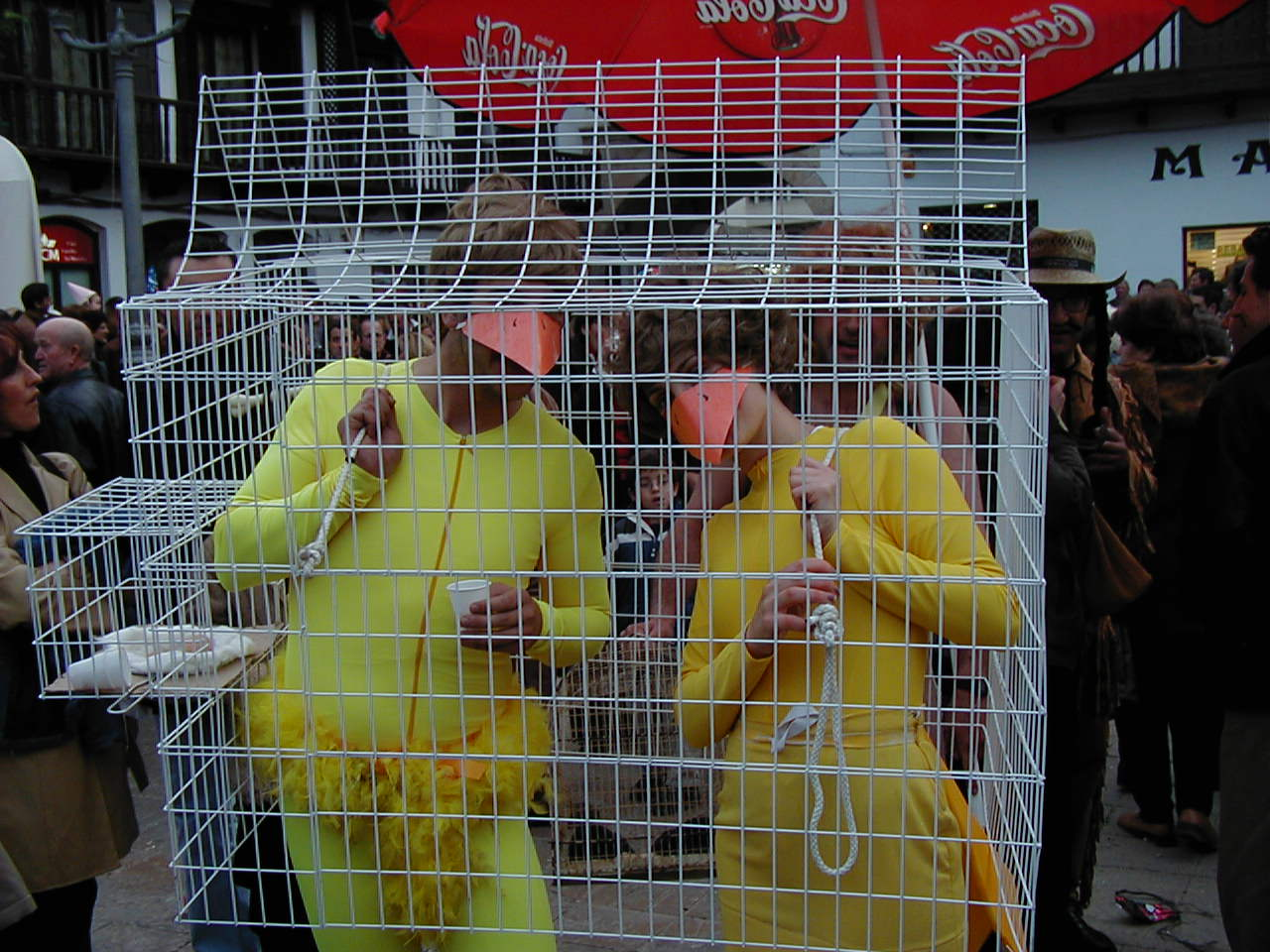 Dos pollitos enjaulados. Numero de carnaval 2002. Tarazona de la Mancha (Albacete)